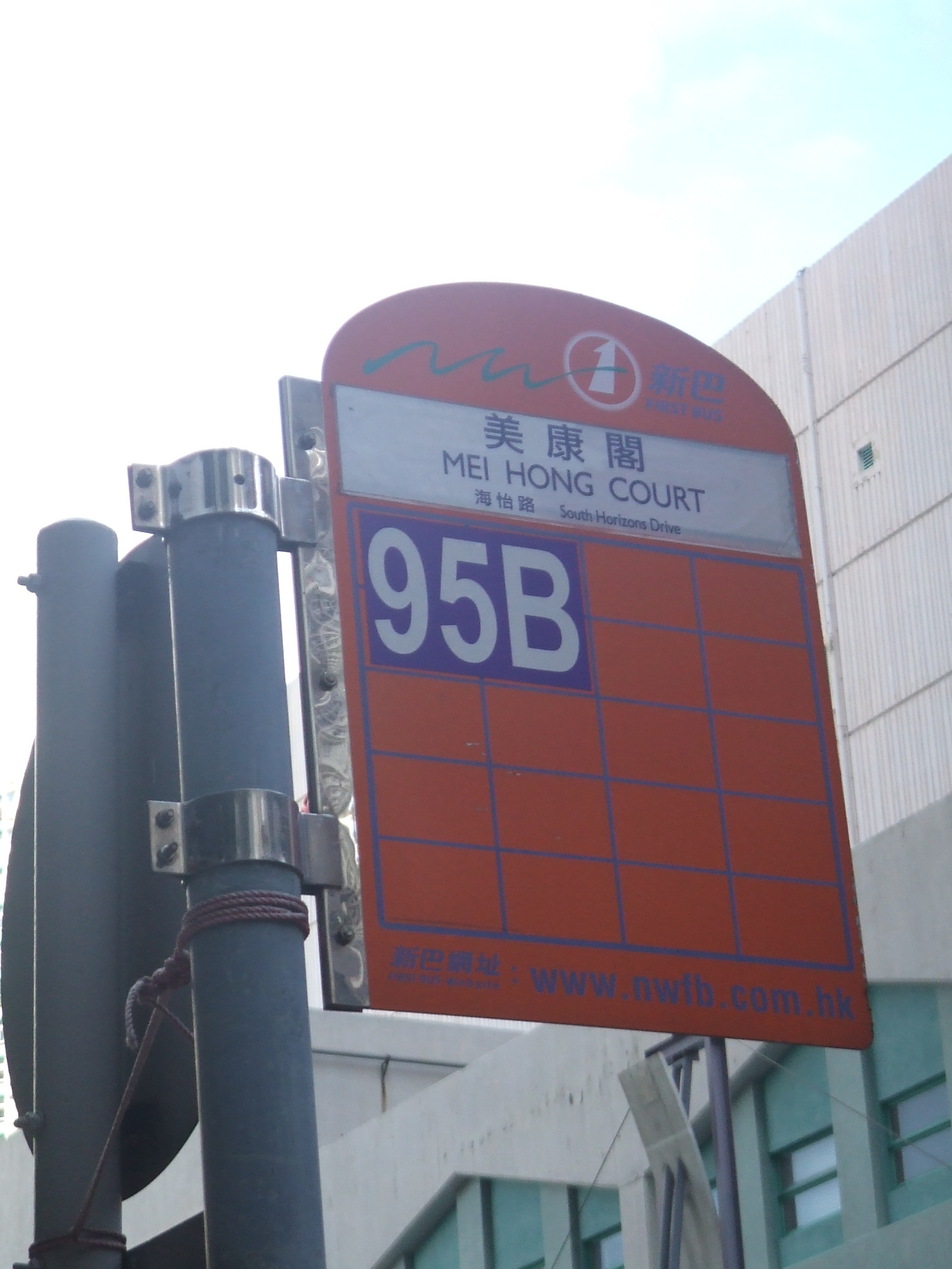 新巴95B線總站